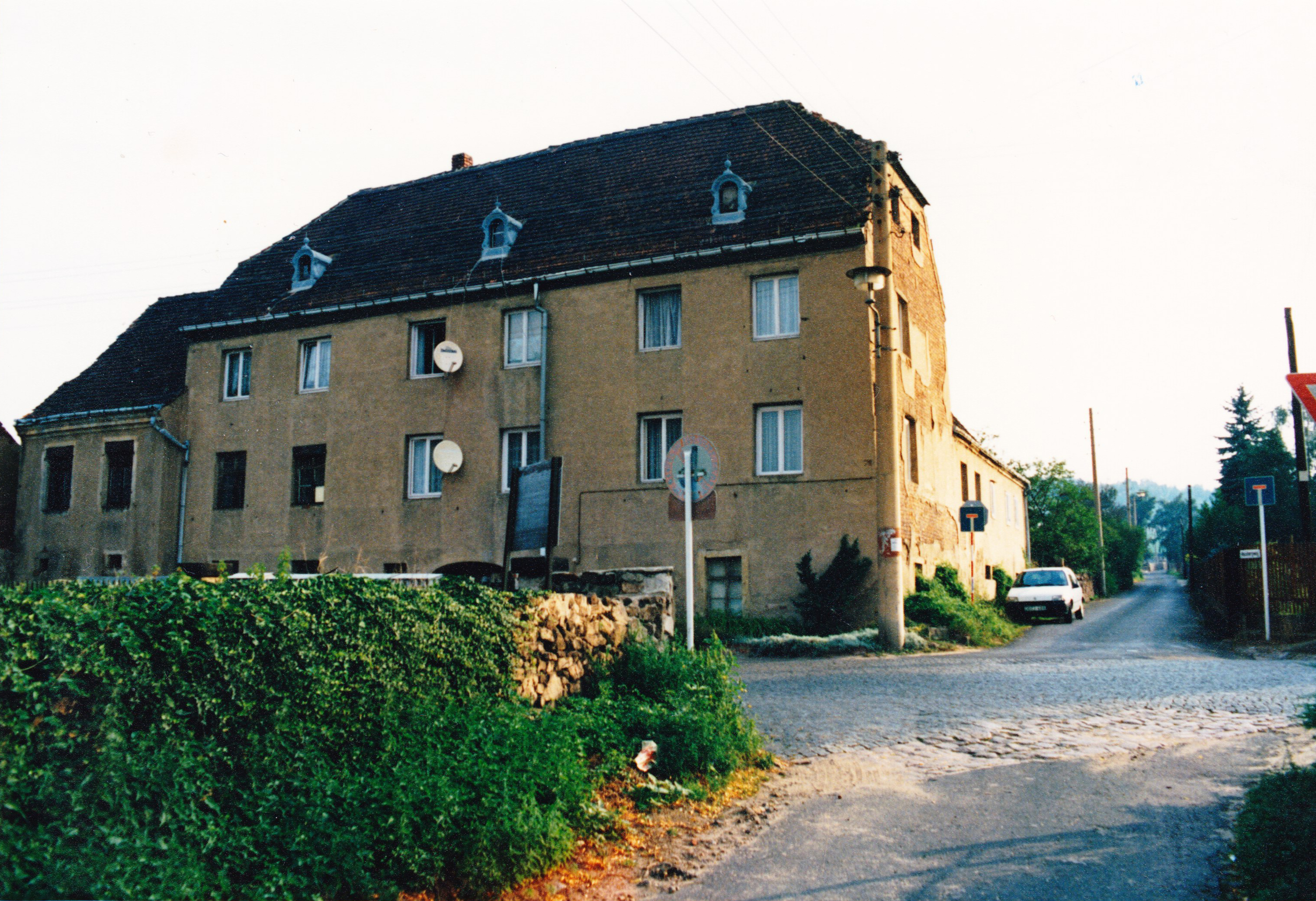 Radebeul-Zitzschewig, Weingut Hausberg, Foto 1992.